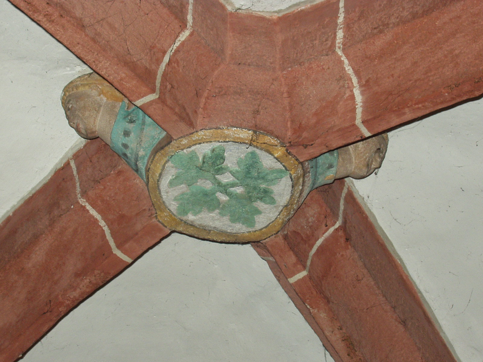 Schlussstein in der Evangelischen Kirche in Allendorf/Lumda, Hessen